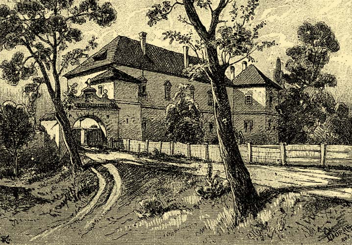 Az alvinci kastély 1890 körül